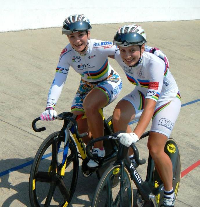 Miriam Welte (r.) und Kristina Vogel bei den Deutschen Bahmmeisterschaften 2013 in Oberhausen